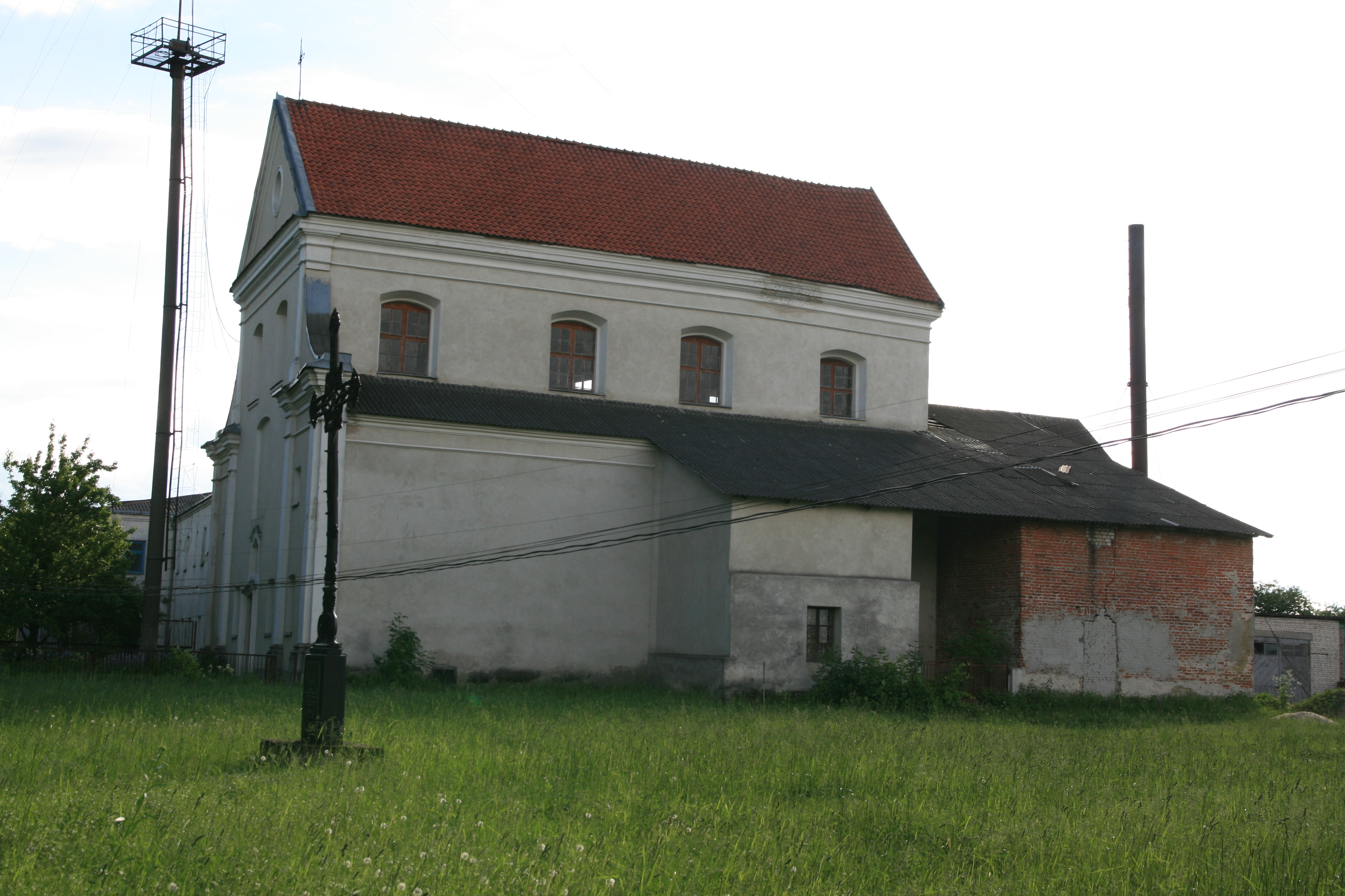 Костел і келії монастиря капуцинів (м), Любешів, вул. Незалежності, 95